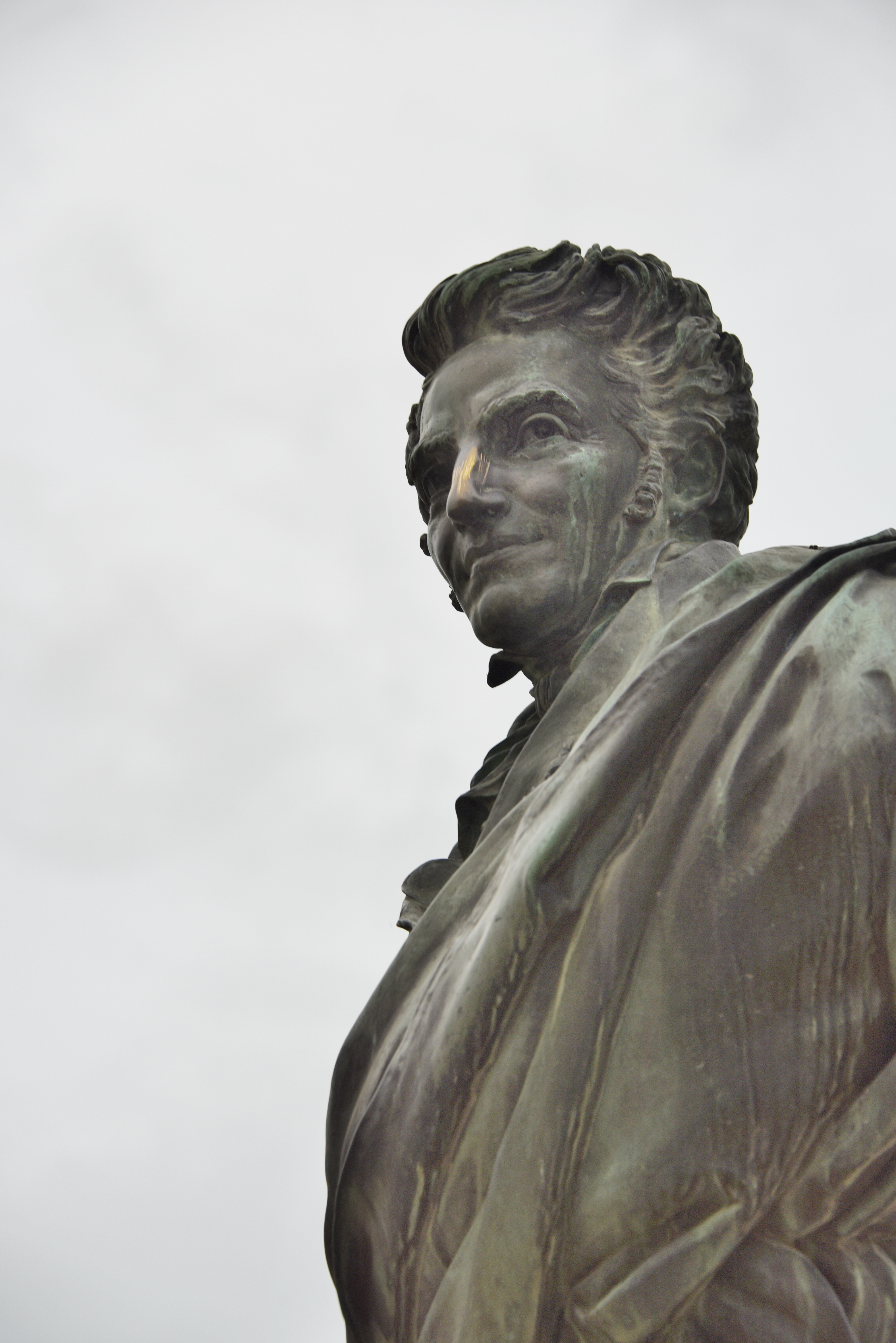 Büste für Pierre Paul Prud’hon